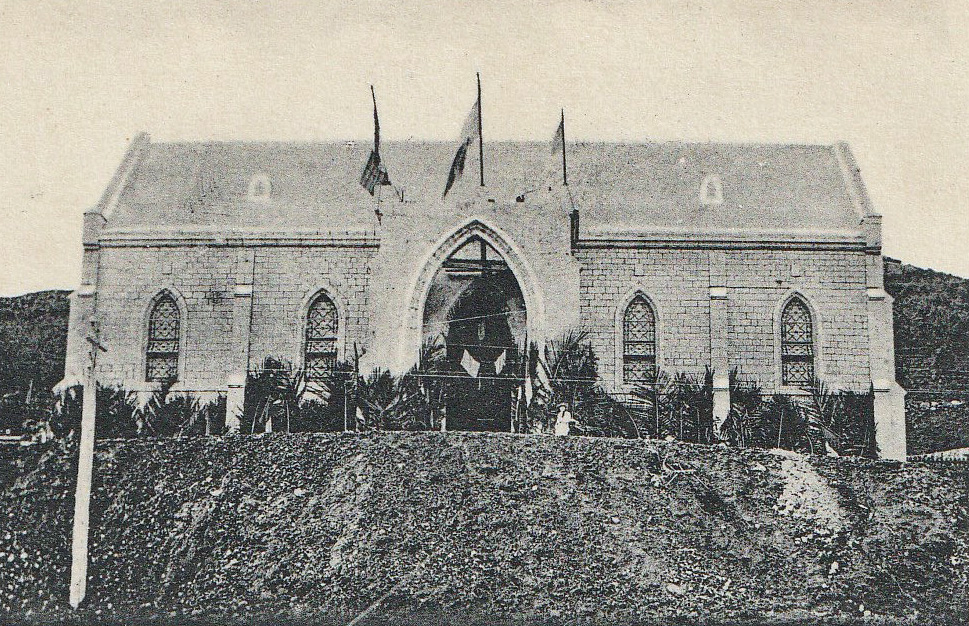 Nouméa (Nouvelle Calédonie). Le Temple. Carte postale ancienne (recadrée), sans mention d'auteur, d'éditeur ou de date.